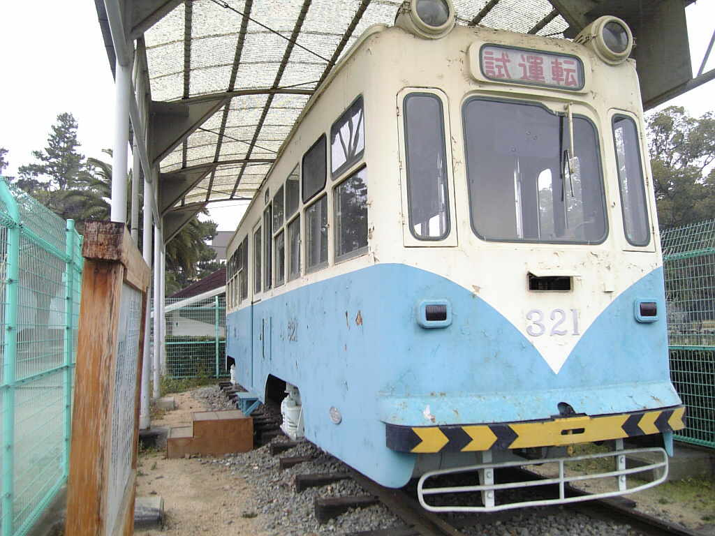 南海和歌山軌道線の電車 旅行中に本人撮影。